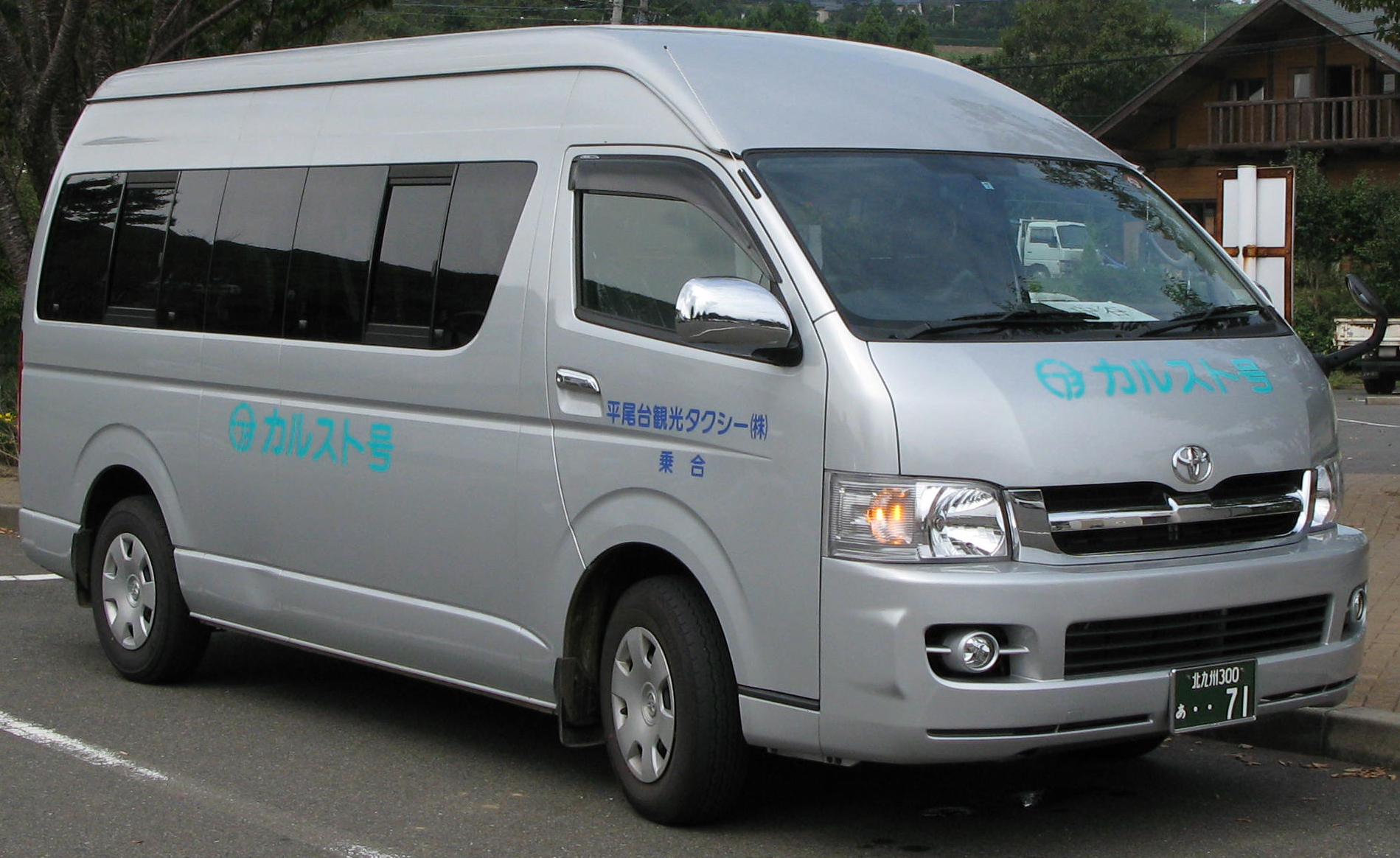 平尾台観光タクシー 北九州市おでかけ交通「カルスト号」の車両